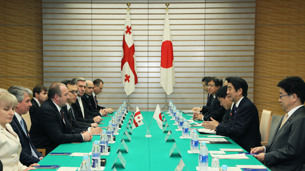 平成26年10月24日 日・グルジア首脳会談等 日・グルジア首脳会談